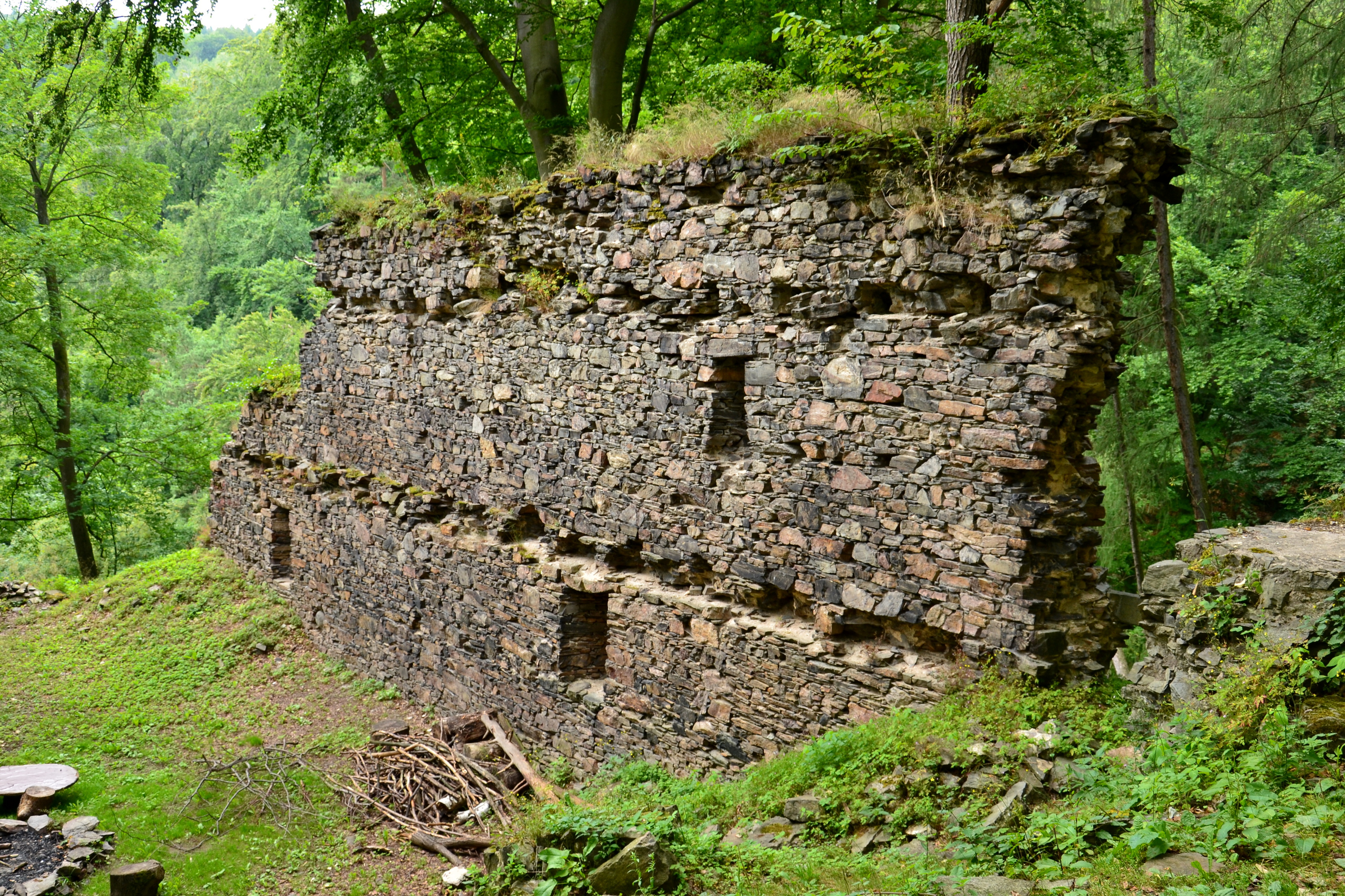 Zřícenina hradu Rýzmburk - zeď hospodářské budovy, Osek (okres Teplice).